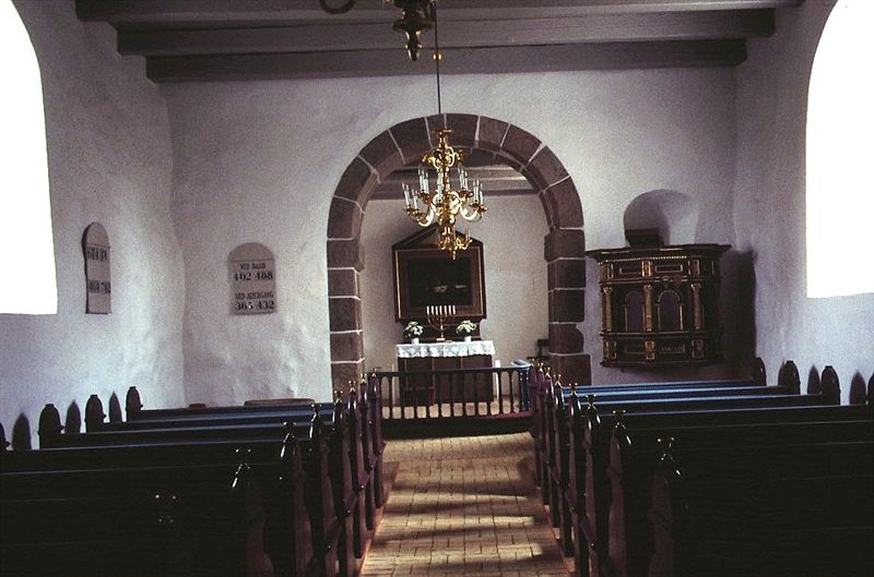 Kirkerummet i Nim Kirke der ligger små 10 km nordvest for Horsens i det tidligere Nim Herred, Skanderborg Amt, nu Horsens Kommune, Region Midtjylland.